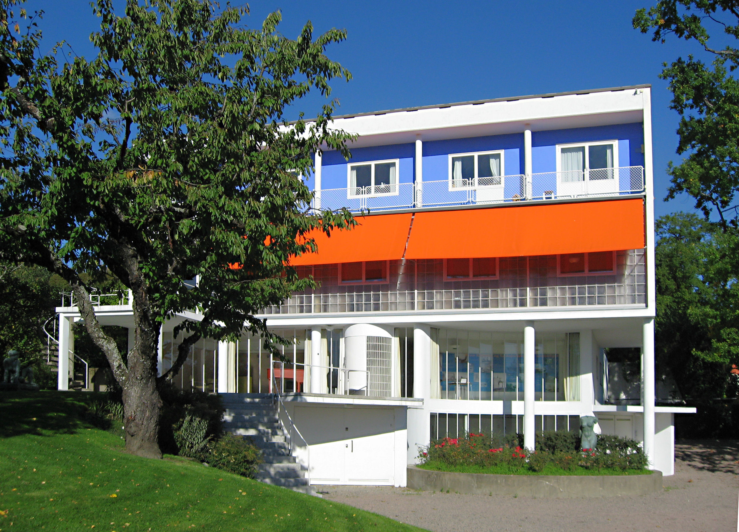 Villa Stenersen in Oslo, Norway)